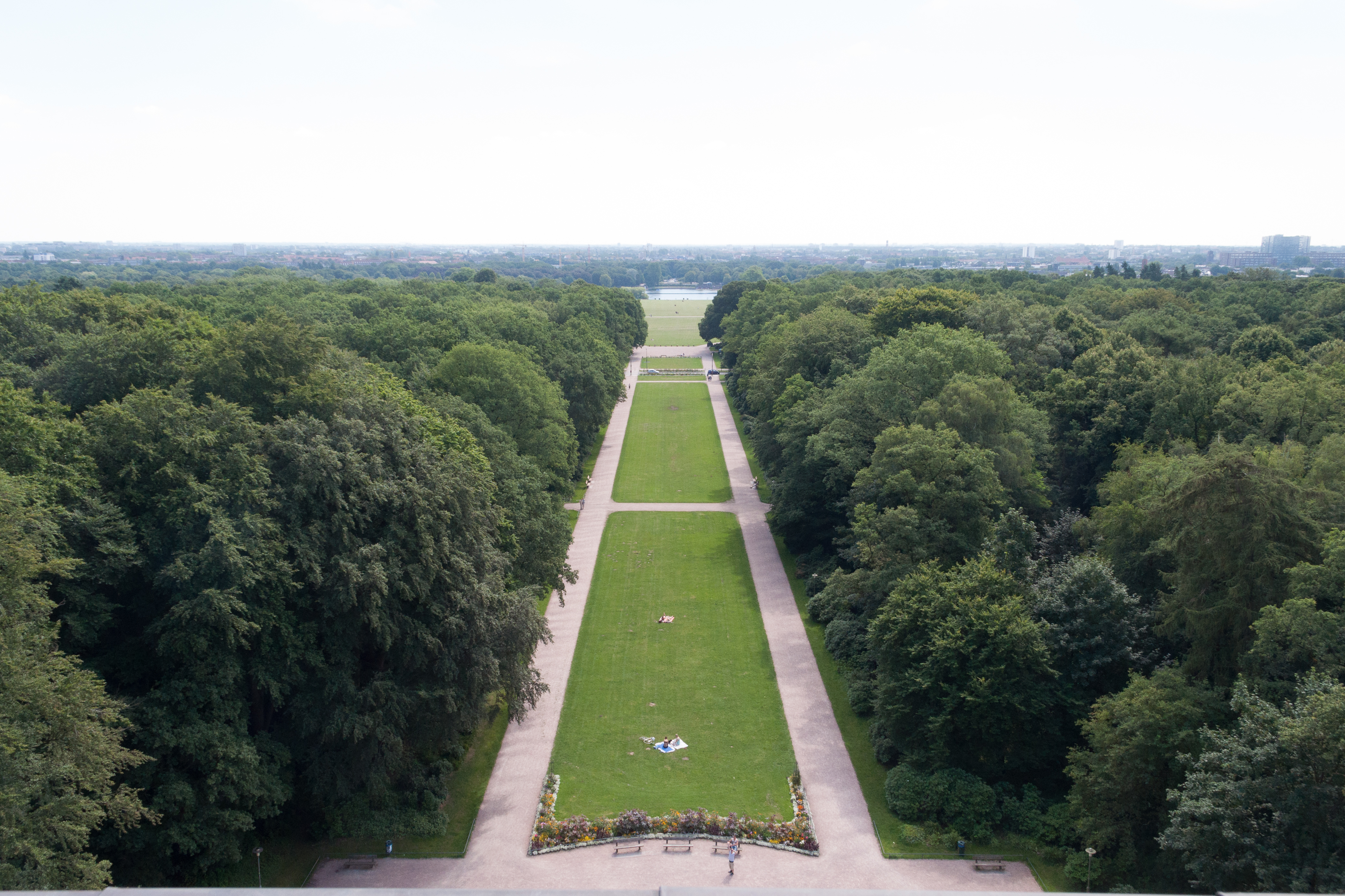 Blick vom Planetarium auf den Stadtpark in Hamburg-Winterhude. This is a photograph of an architectural monument.